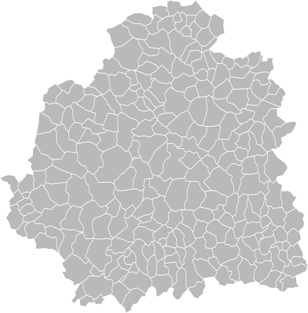 Carte des communes de l'Indre (36).